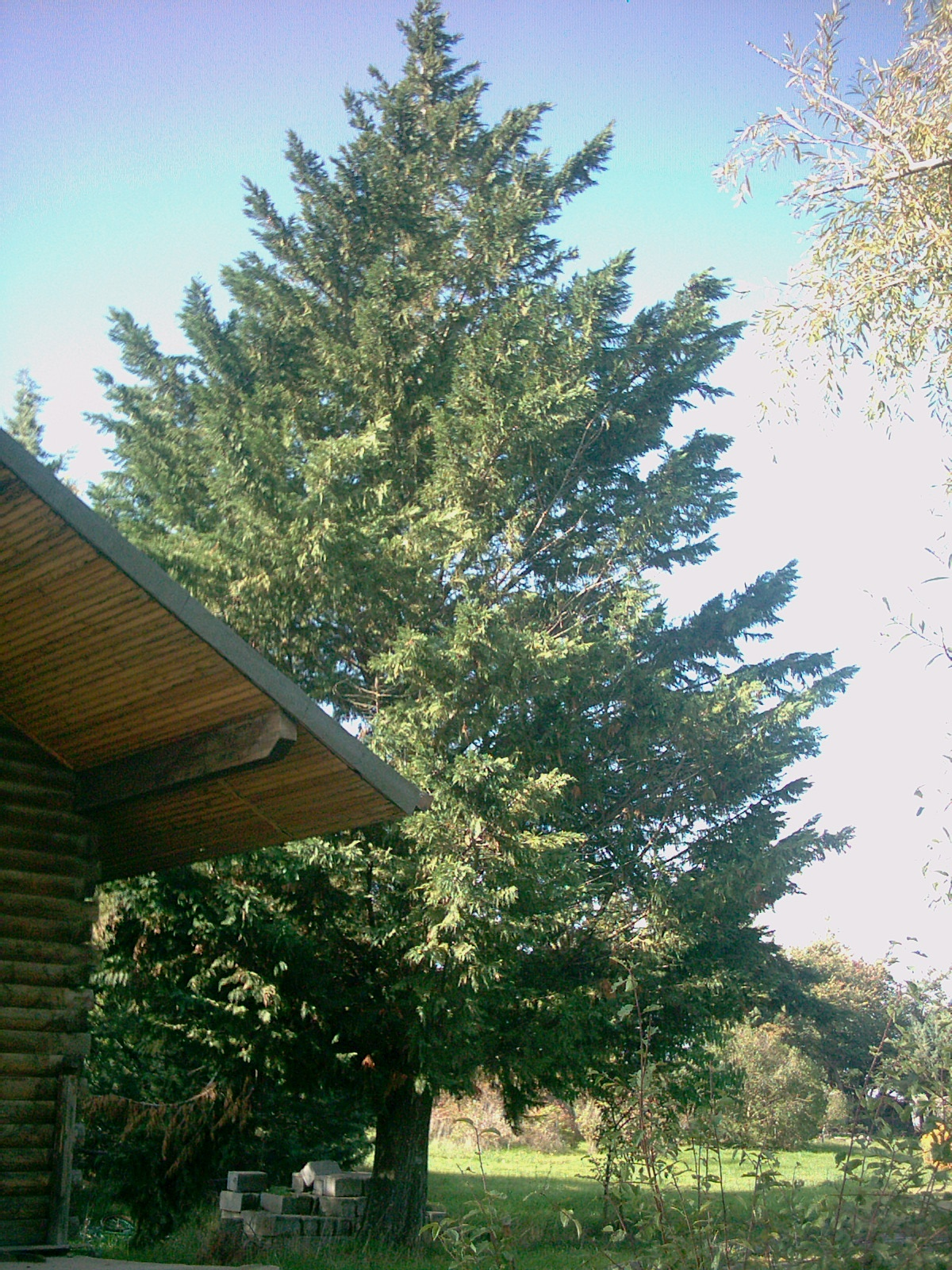 Albero presente nell'orto botanico di Lagopesole